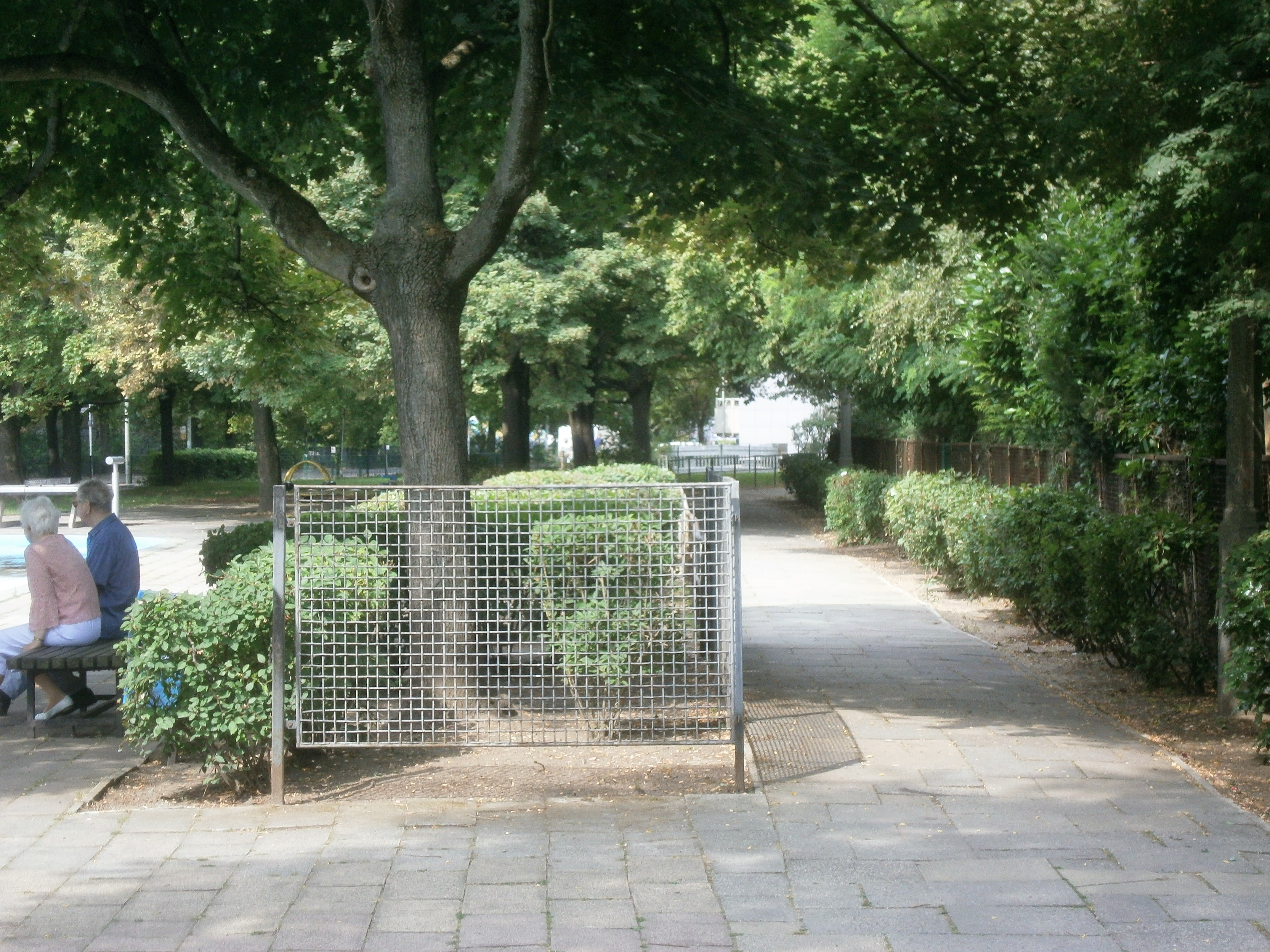 Die Blumenstraße in Berlin verlief bis zur Aufhebung des westlichen Abschnitts bis an die Alexanderstraße. Der alte Lauf wurde überbaut, die Straßenlage als Neue Blumenstraße nach Norden gezogen. Eines der Rudimente des alten Laufs findet sich in Fußweg an der Nordseite der Plansche Singerstraße, Grundstücksgrenze Neue Blumenstraße 5 (vormals Kinderkrippe, genutzt als buddhistisches Zentrum. Blickrichtung zu Neue Blumenstraße 1.